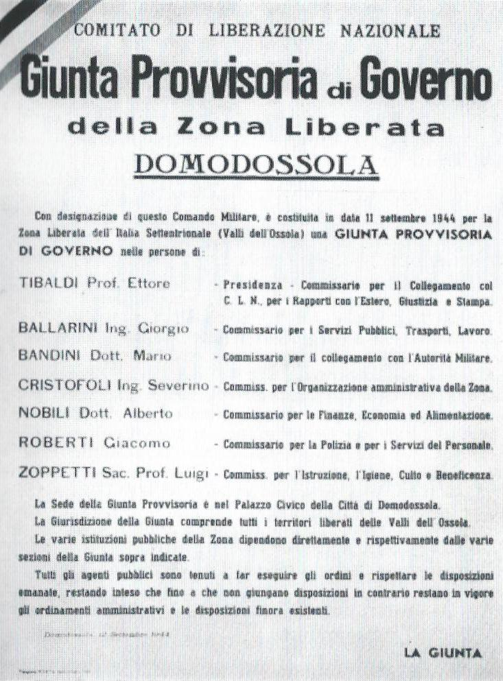 Il Manifesto che annuncia la formazione della Giunta provvisoria di Governo di Domodossola e della Zona liberata